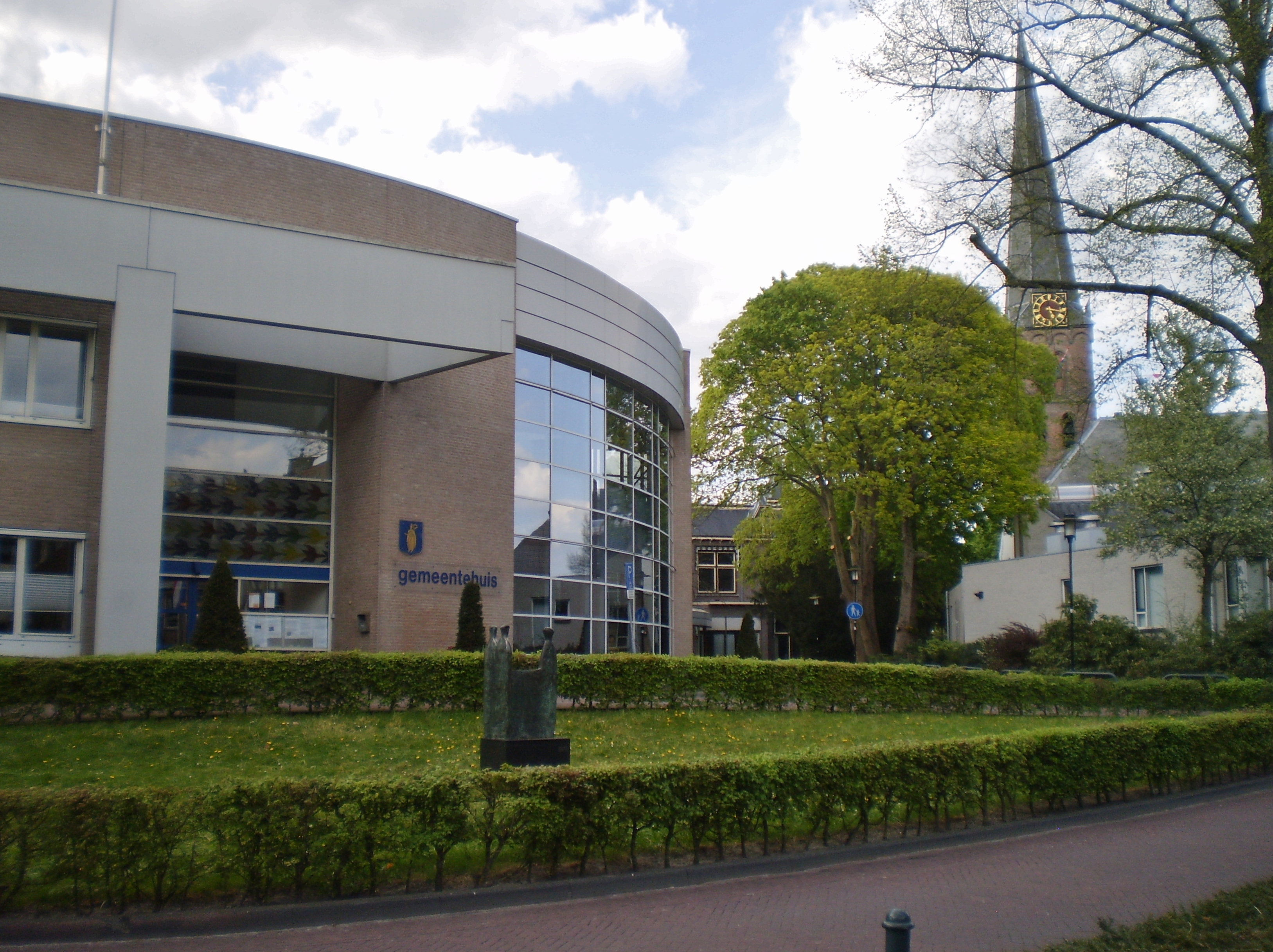 Nieuwe gemeentehuis. Op de achtergrond rechts het oude gebouw en de Pauluskerk